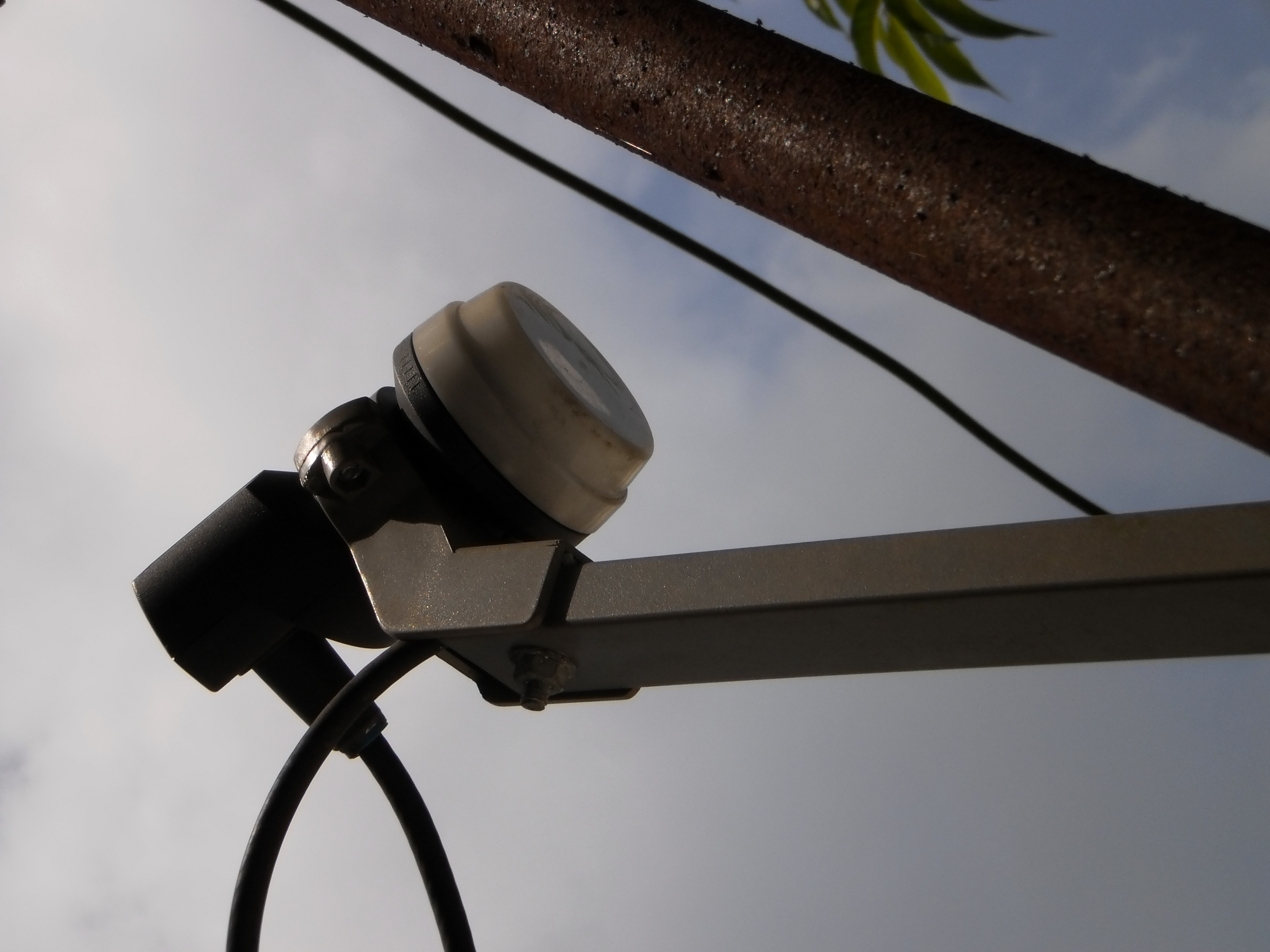 ഡി.ടി.എച്ച്. ആന്റിനയുടെ എല്‍.എന്‍.ബി.